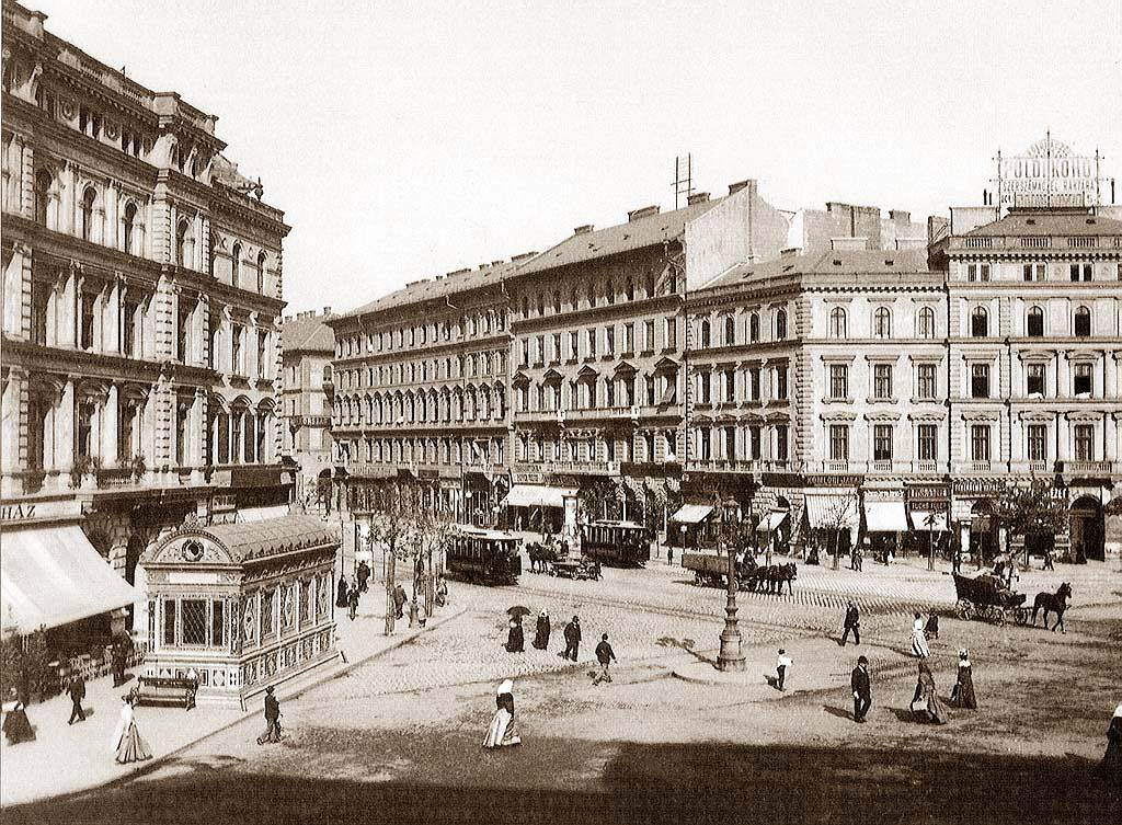 Az oktogon a XIX. század végén és a XX. század elején - Budapest